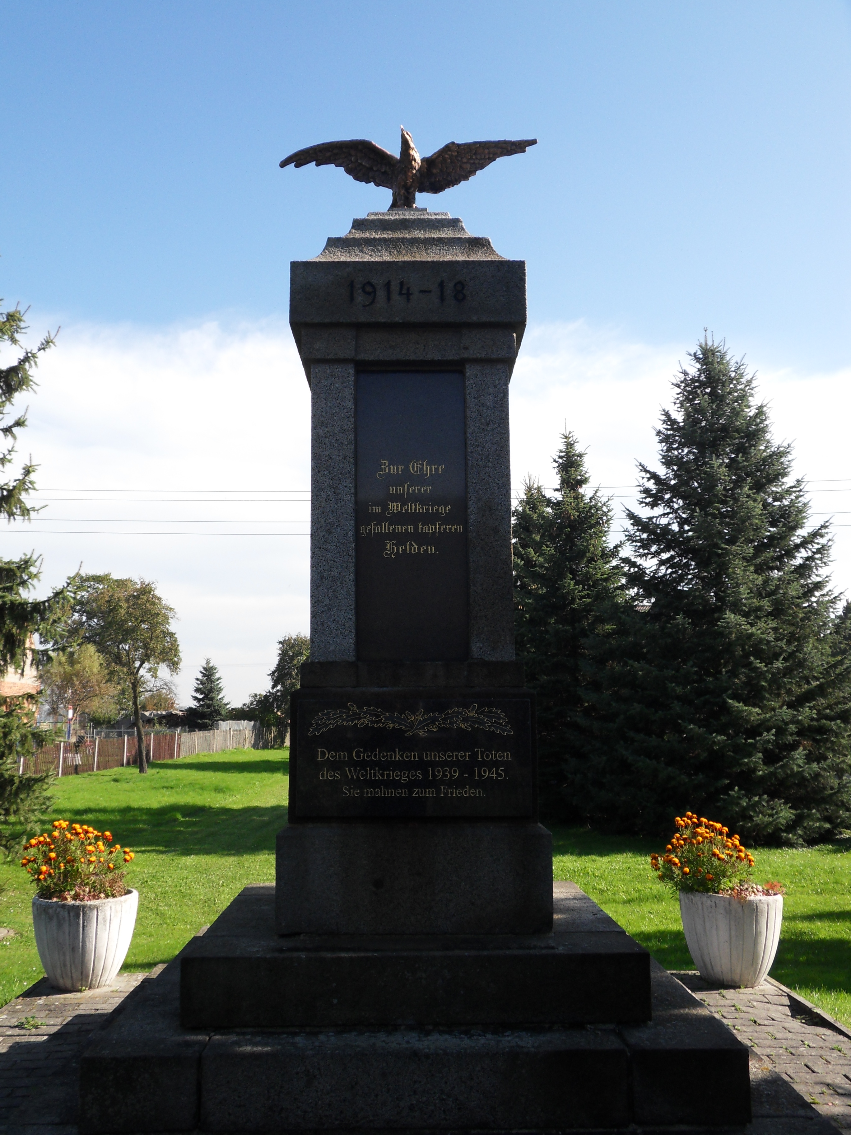 Kriegerdenkmal für die Gefallenen des Ersten Weltkriegs in Arenzhain